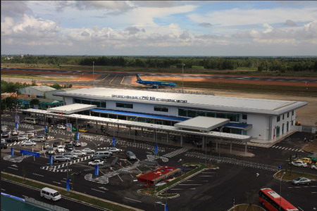 san bay Phu Bai